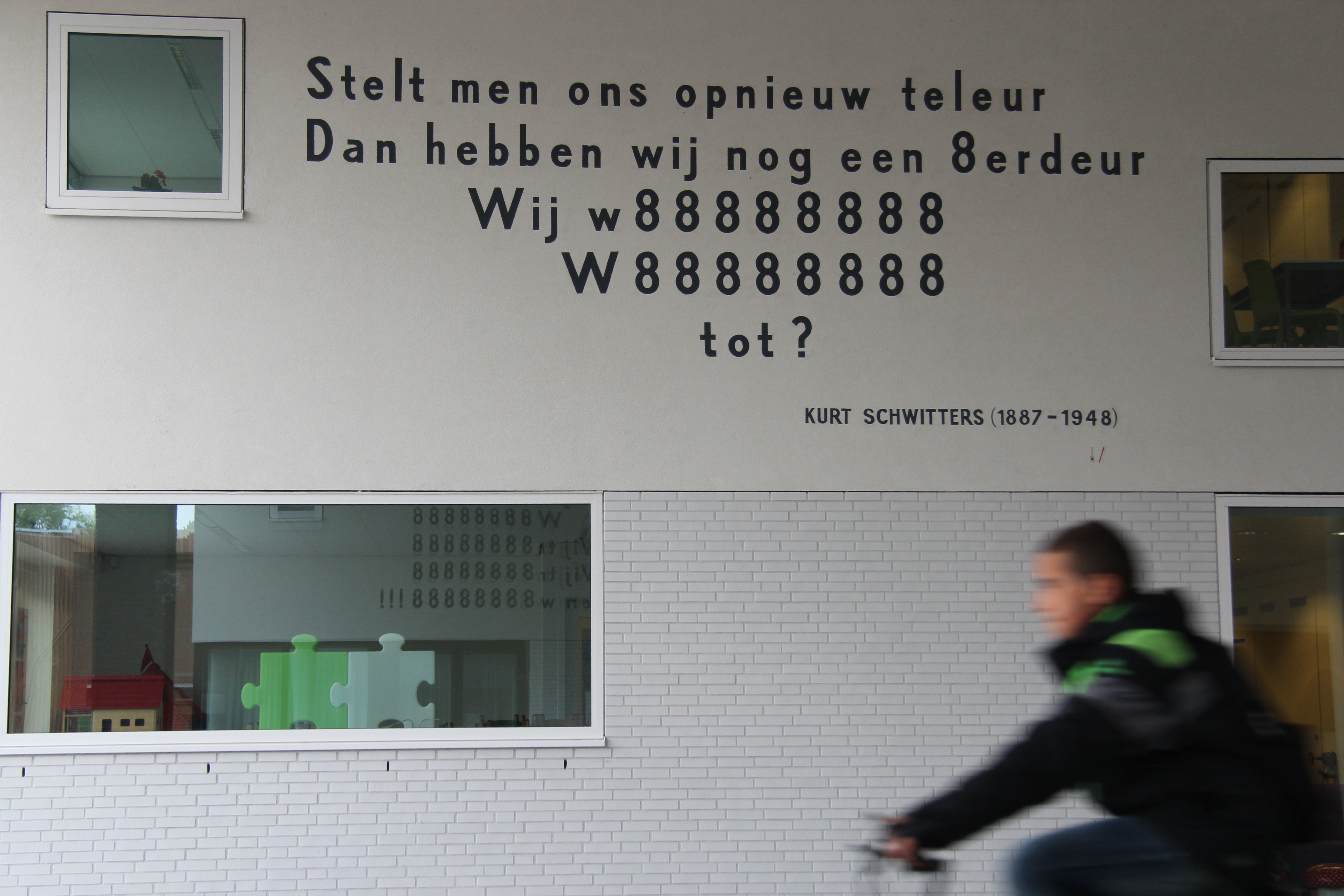 Muurgedicht Kurt Schwitters - wij w88888888. Muurgedicht in doorgang van 'Het Gebouw' in Leiden. 2013